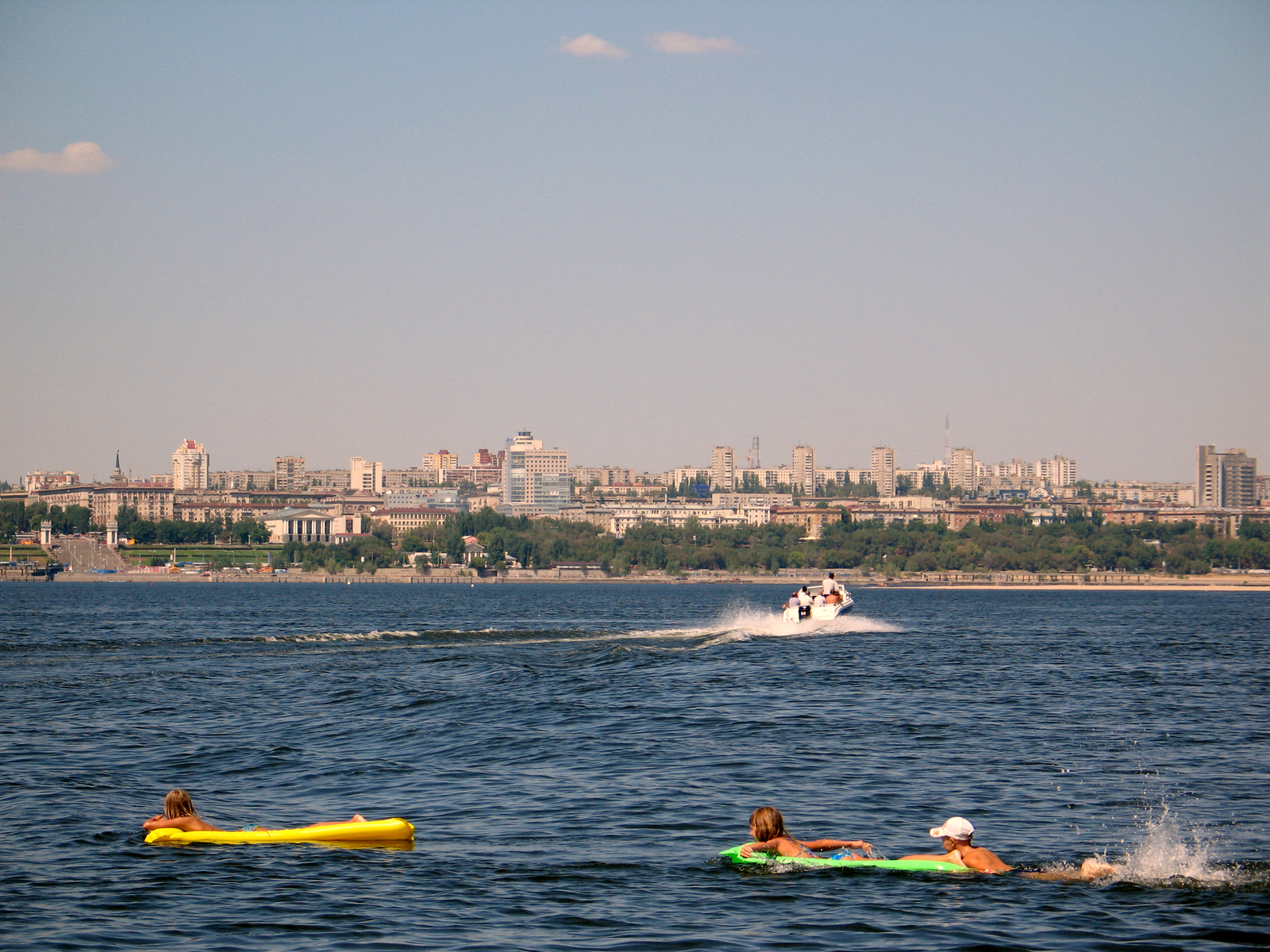 Panorama2. Volga. Foto by Victor Belousov.